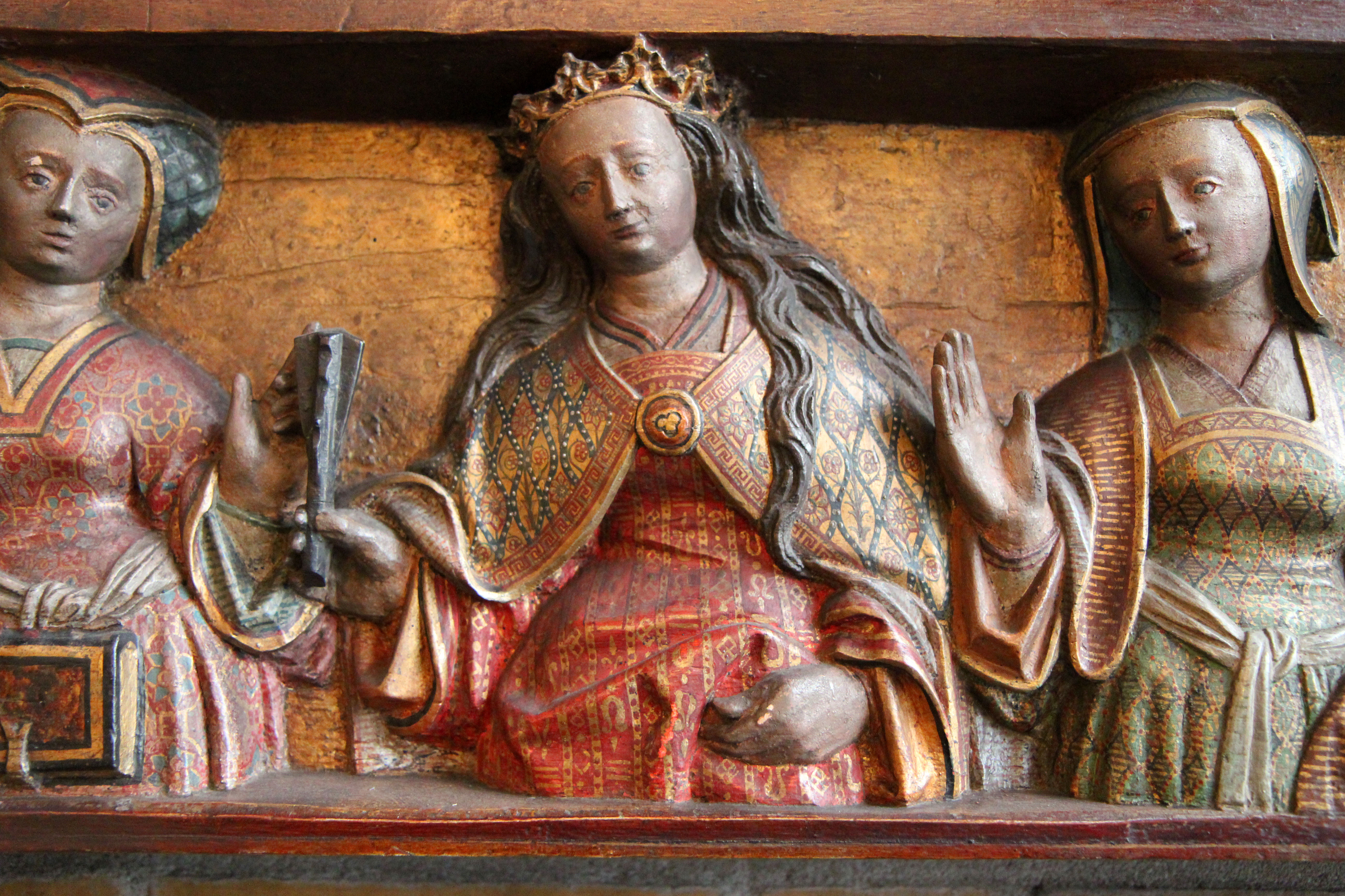 St. Wendelinus, Hürth-Berrenrath. Ursula-Fries der Marienkapelle. Ausschnitt eines Eichenholzfrieses des 15. Jahrhunderts. Das Kunstwerk gehörte als Altarpedrella zur Ausstattung der alten Berrenrather Kirche, die es wahrscheinlich aus dem Bestand des niedergelegten Klosters Marienborn erhalten hatte. Das Fries hat die Maße von 0, 25 cm X 1, 85 m und zeigt die heilige Ursula mit acht Gefährtinnen. Textquelle: Paul Clemen: Im Auftrage des Provinzialverbandes der Rheinprovinz Die Kunstdenkmäler der Rheinprovinz, in: Die Kunstdenkmäler der Stadt und des Landkreises Bonn, Band V, III. Druck und Verlag L. Schwann, Düsseldorf 1905, Nachdruck 1981. ISBN 3-590-32113- X , S. 15 f